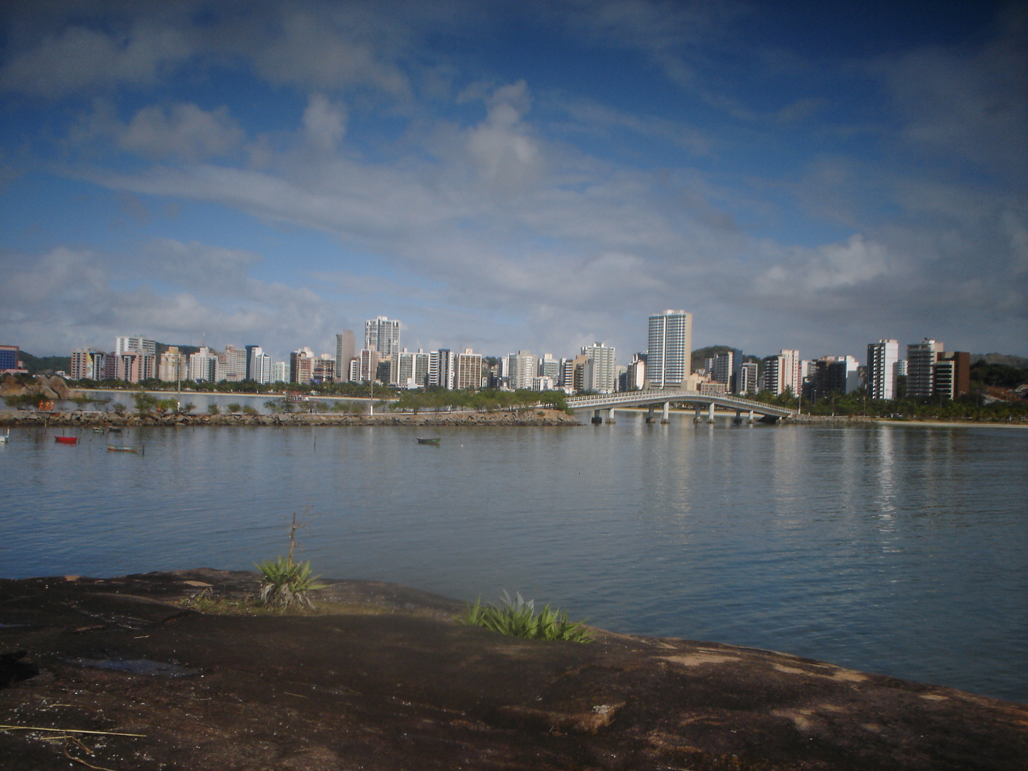 Praia em Vitória/ES